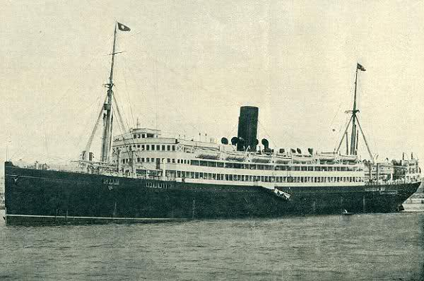 Vapor Infanta Isabél de Borbón de la Cª Transatlántica, España